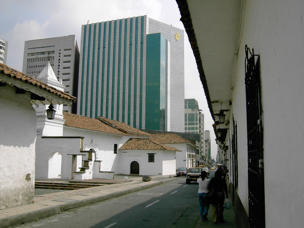 Iglesia La Merced, SAntiago de Cali, Colombia